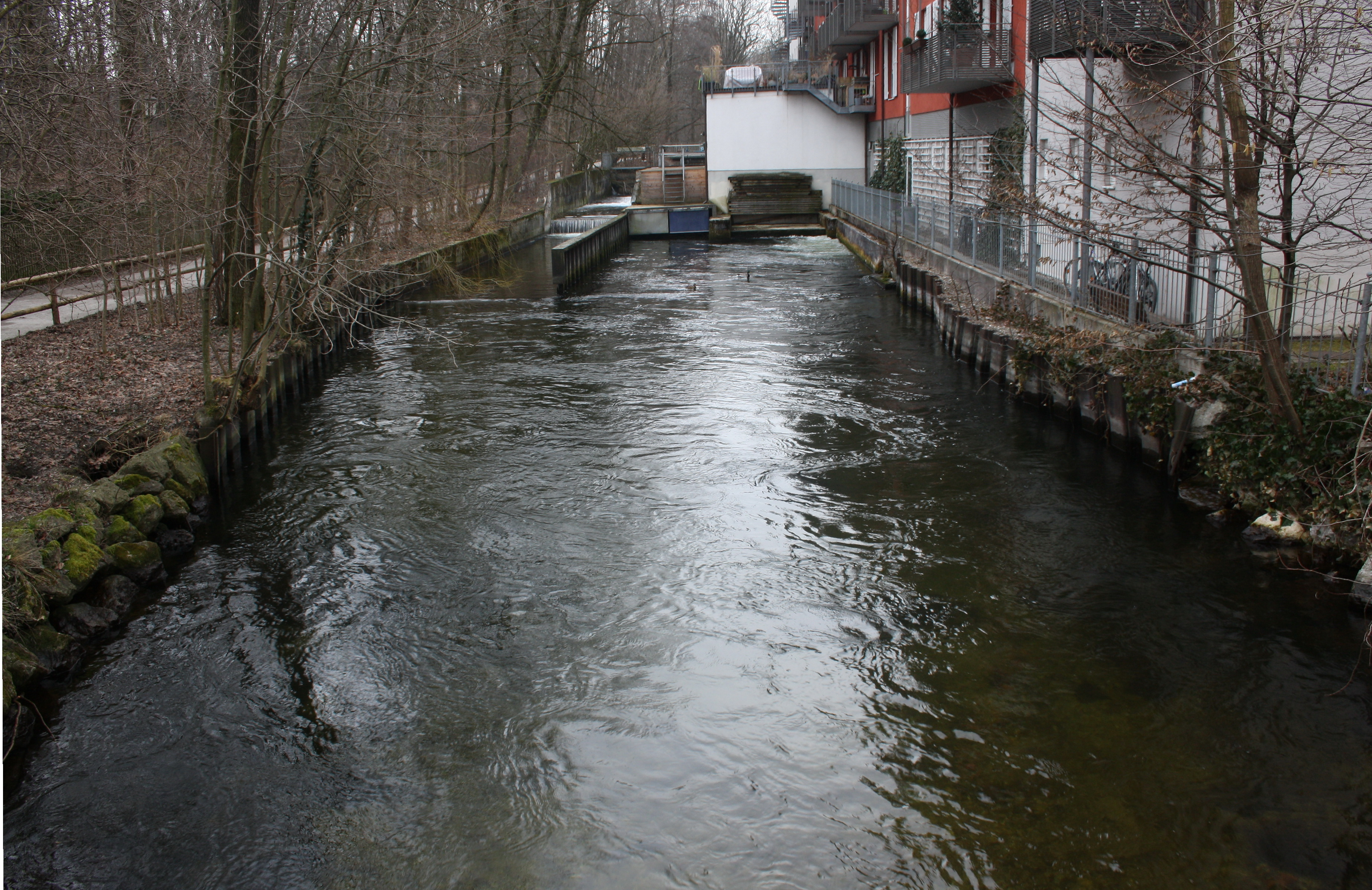 Würm im Bereich des Münchner Stadtteils Pasing. Stauwehr an der alten Mühle